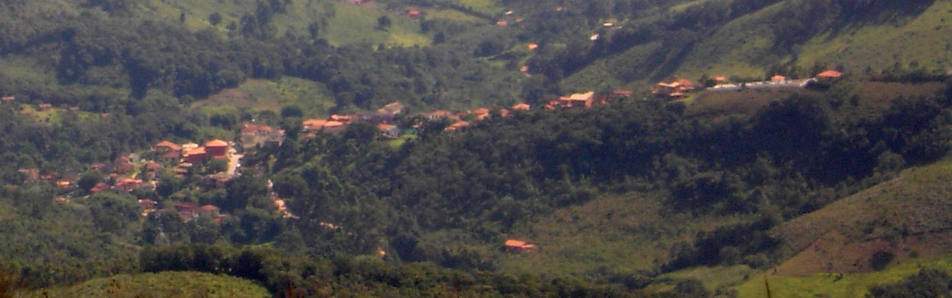 Conceição do Ibitipoca (Arraial de ibitipoca)